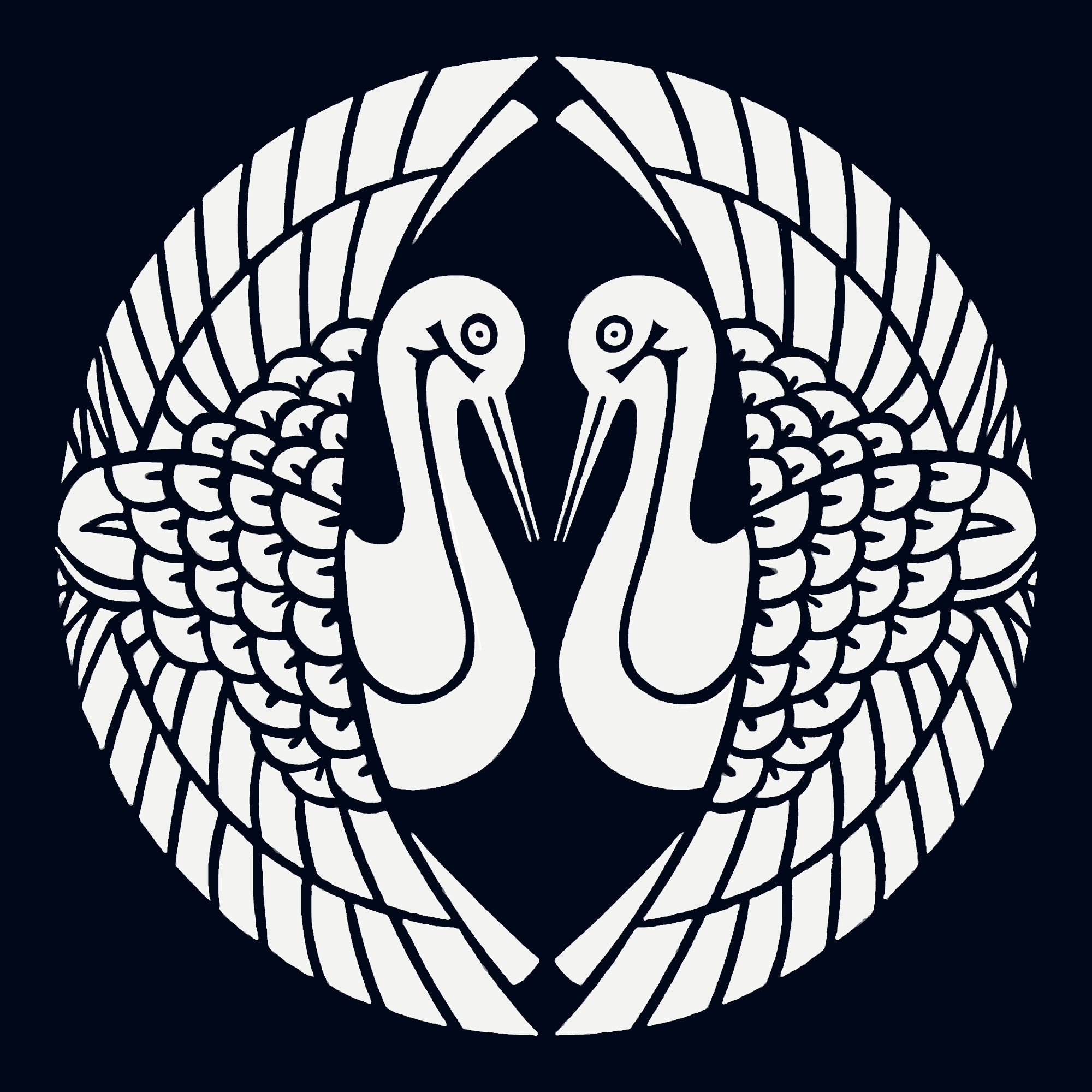 蒲生対い鶴